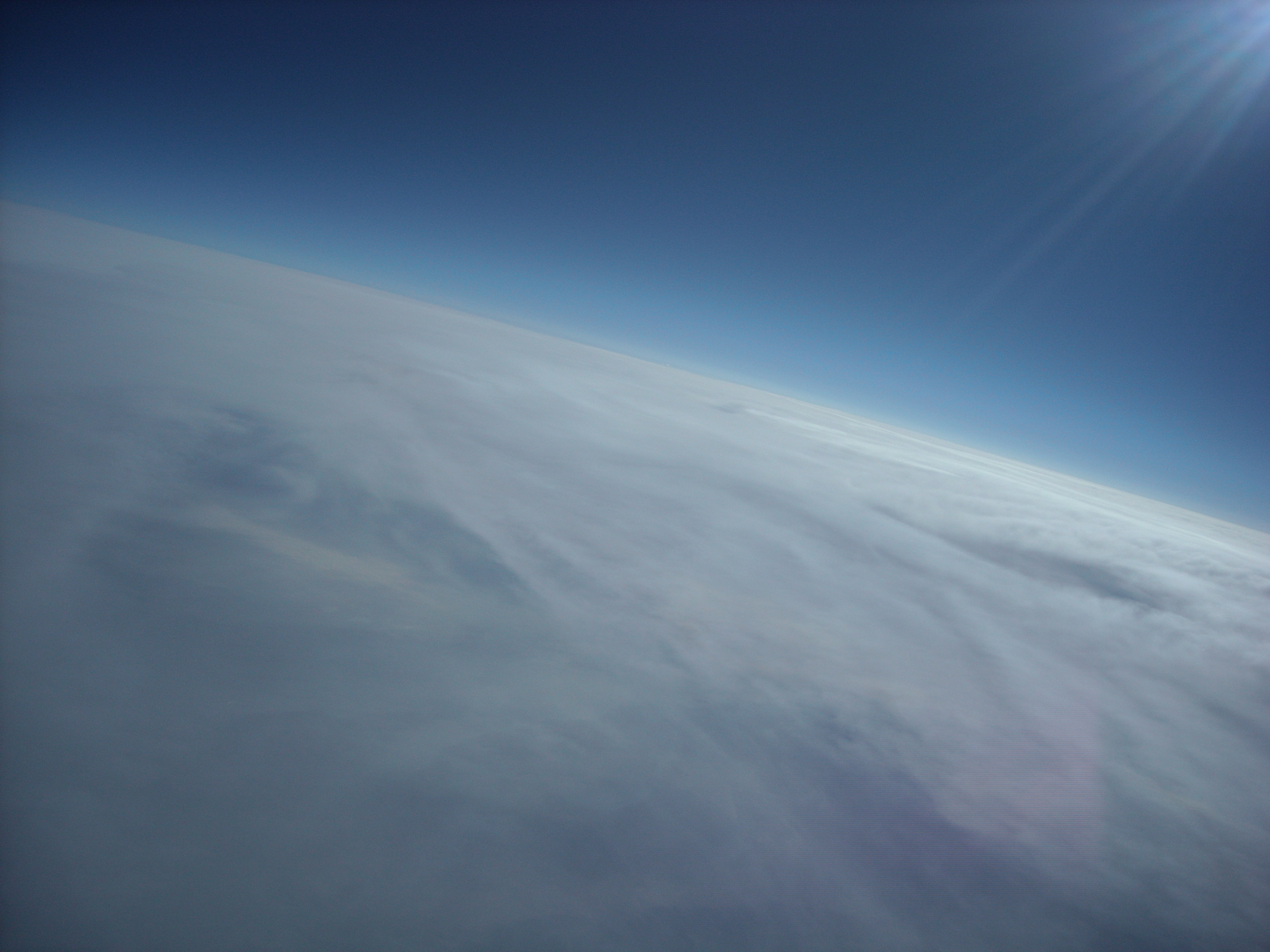 Atmósfera de la tierra.